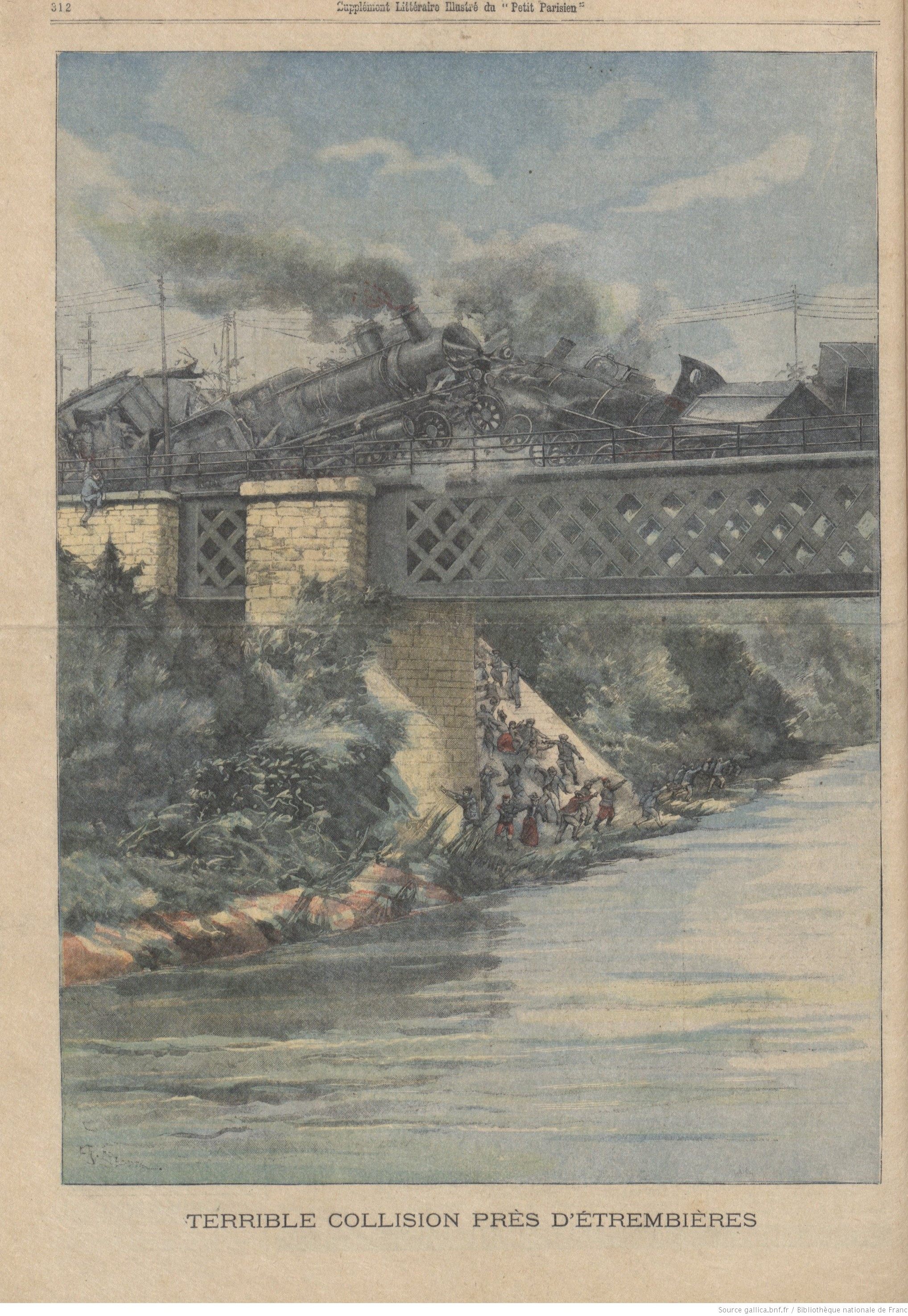 L'accident d'Etrembières (6 septembre 1904), vu par le dessinateur du Supplément littéraire illustré du Petit Parisien.